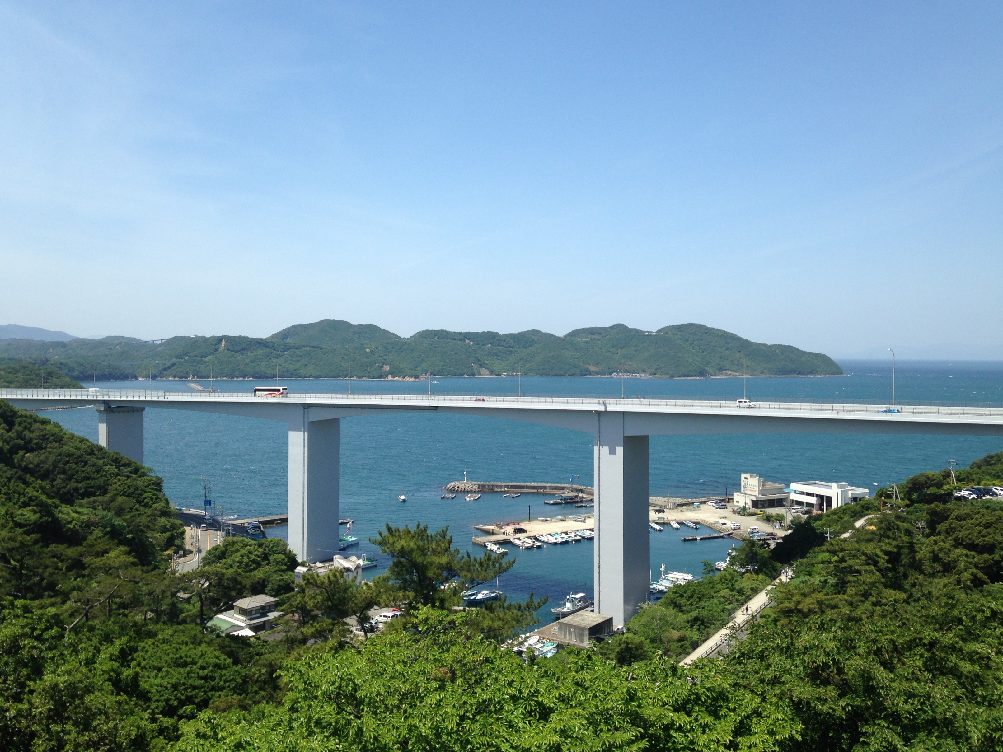 鳴門公園のお茶園展望台より望む亀浦高架橋と島田島